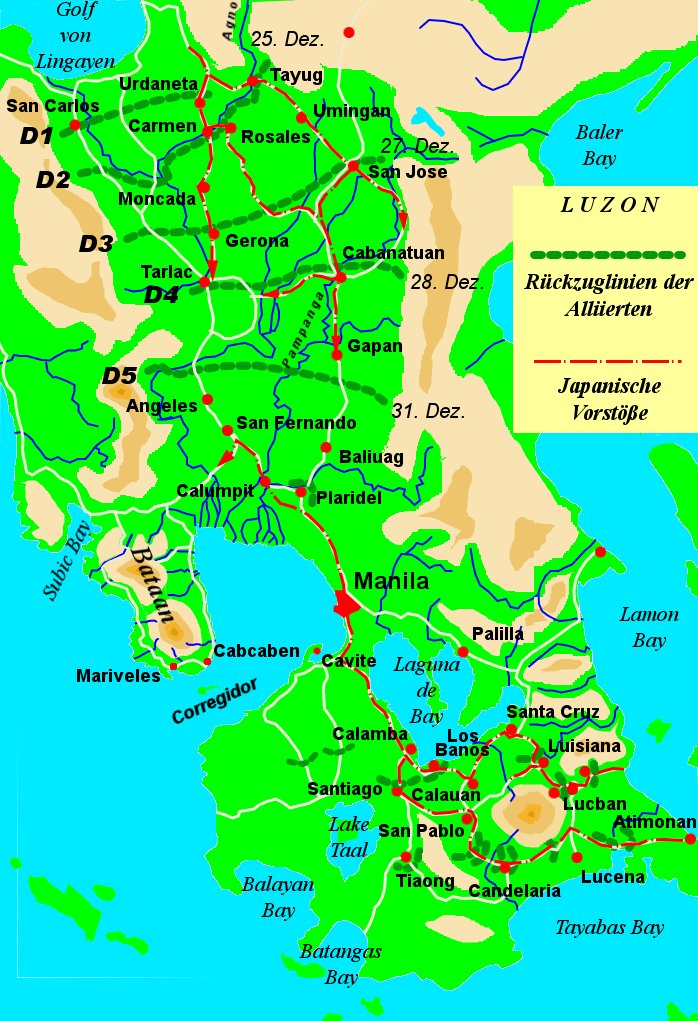 Rückzugslinien der Alliierten auf Luzon Philippinen (Dezember 1941)